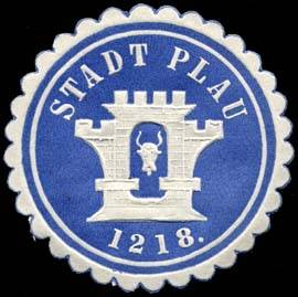 Sealing stamp Title: Stadt Plau Description: Mecklenburg, blau, weiß, geprägt Place: Plau size: 3 cm